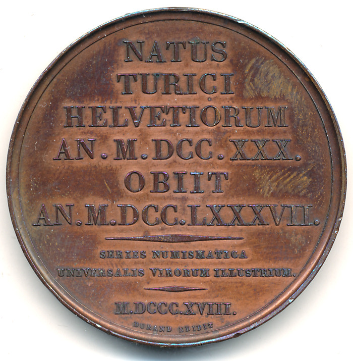 Médaille à l'effigie de Salomon Gessner, 41mm, bronze, revers